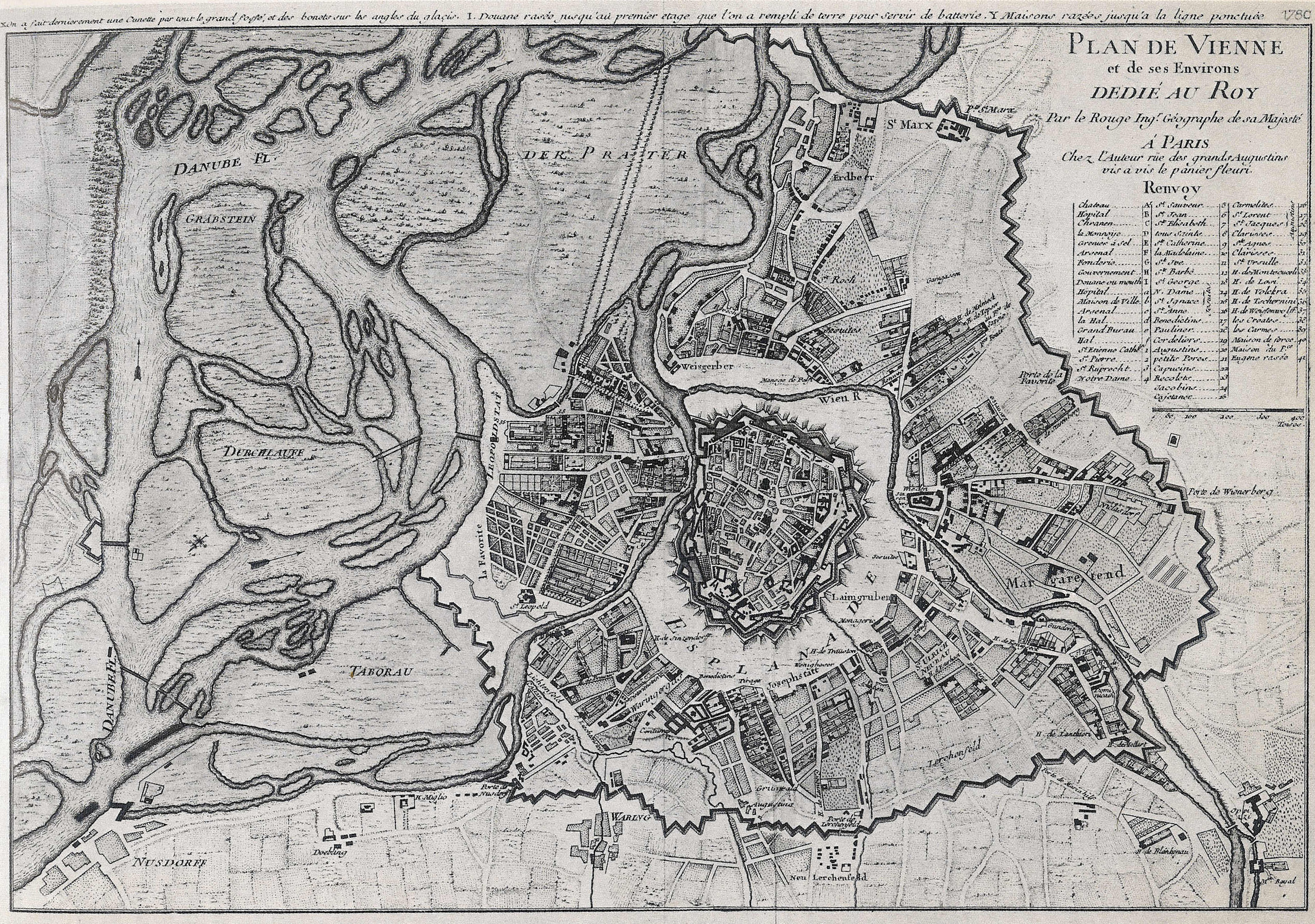 Map of Vienna and the Danube from 1780. Original description (German): "Plan von Wien aus dem Jahr 1780, von einem französischen Kartographen für seinen König angefertigt."